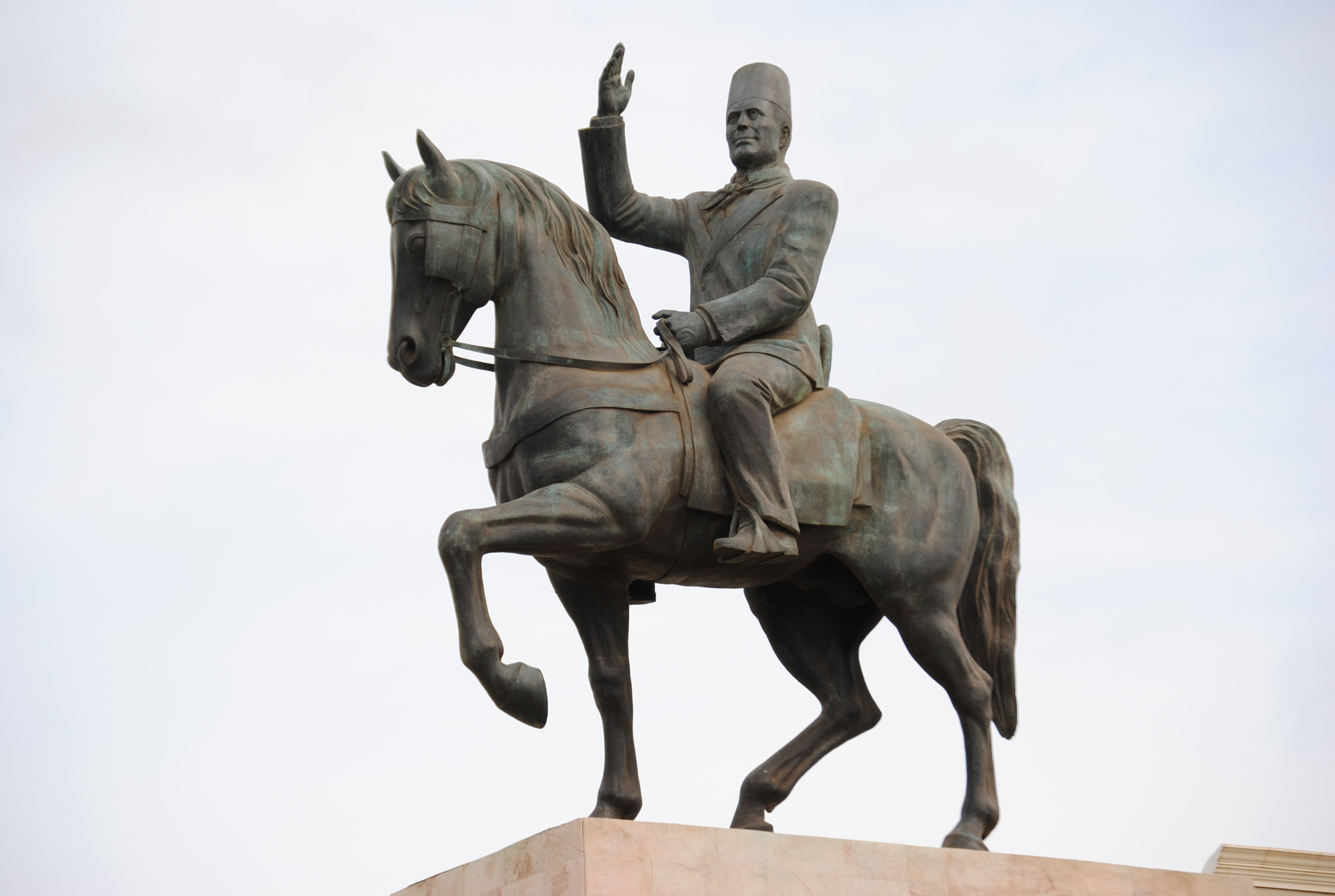 Statue de Habib Bourguiba dans la ville de la Goulette (présente auparavant sur l'avenue Habib-Bourguiba à Tunis).